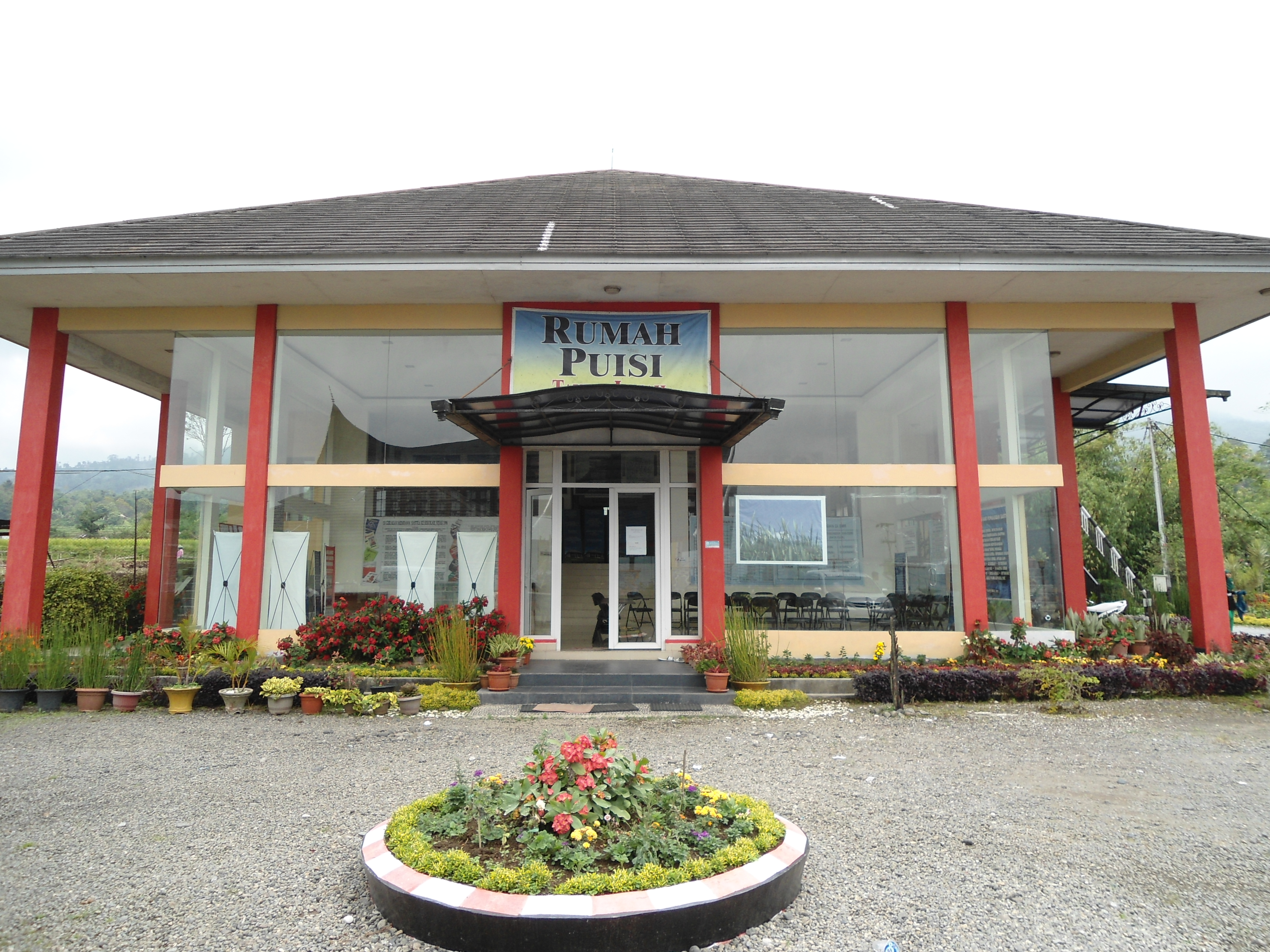 Rumah Puisi Taufiq Ismail